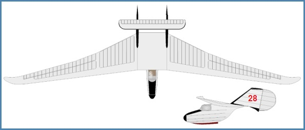 ZAGI BP2